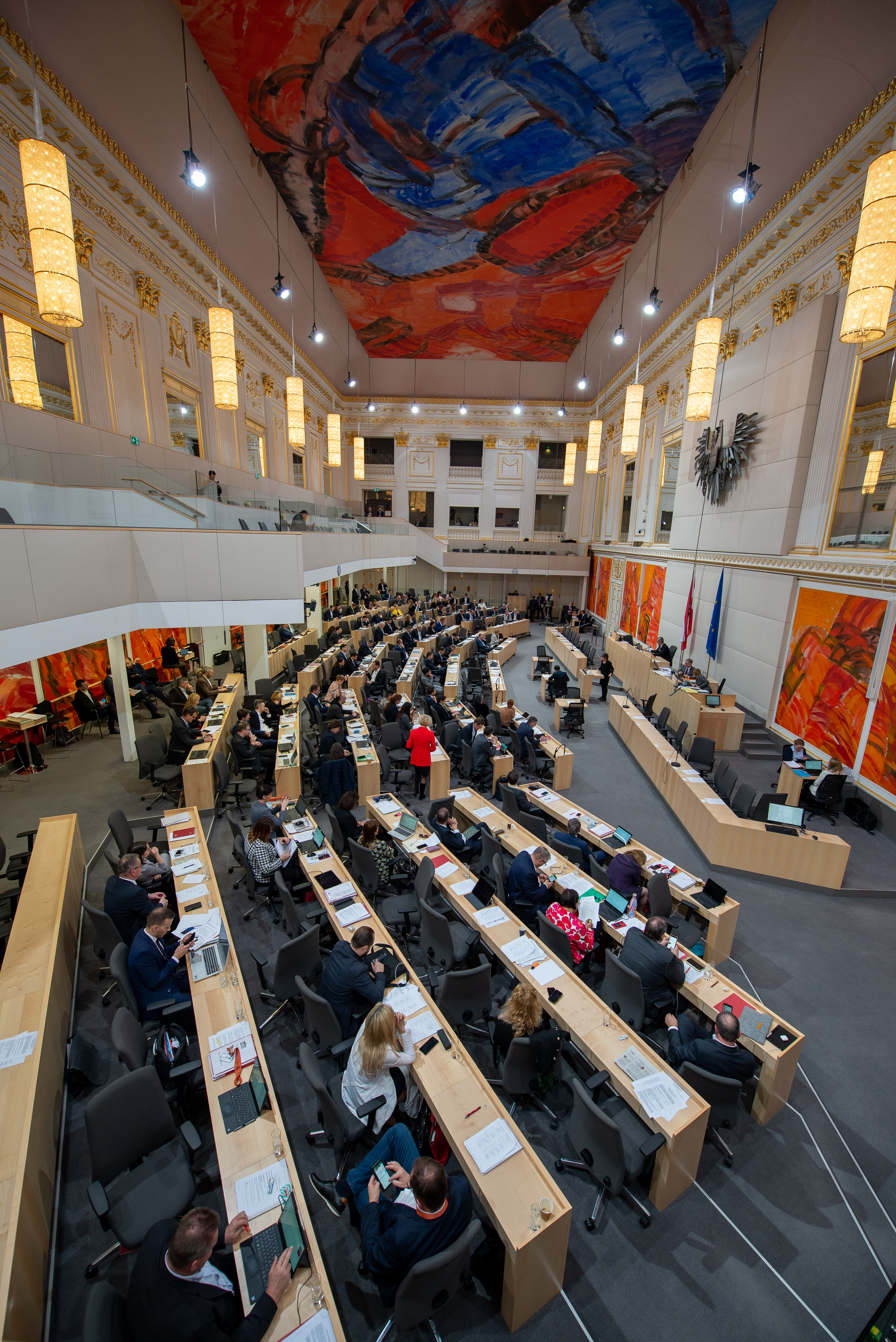 Nationalratssitzung am 27. Februar 2020 im Ausweichquartier des Parlaments in der Wiener Hofburg.